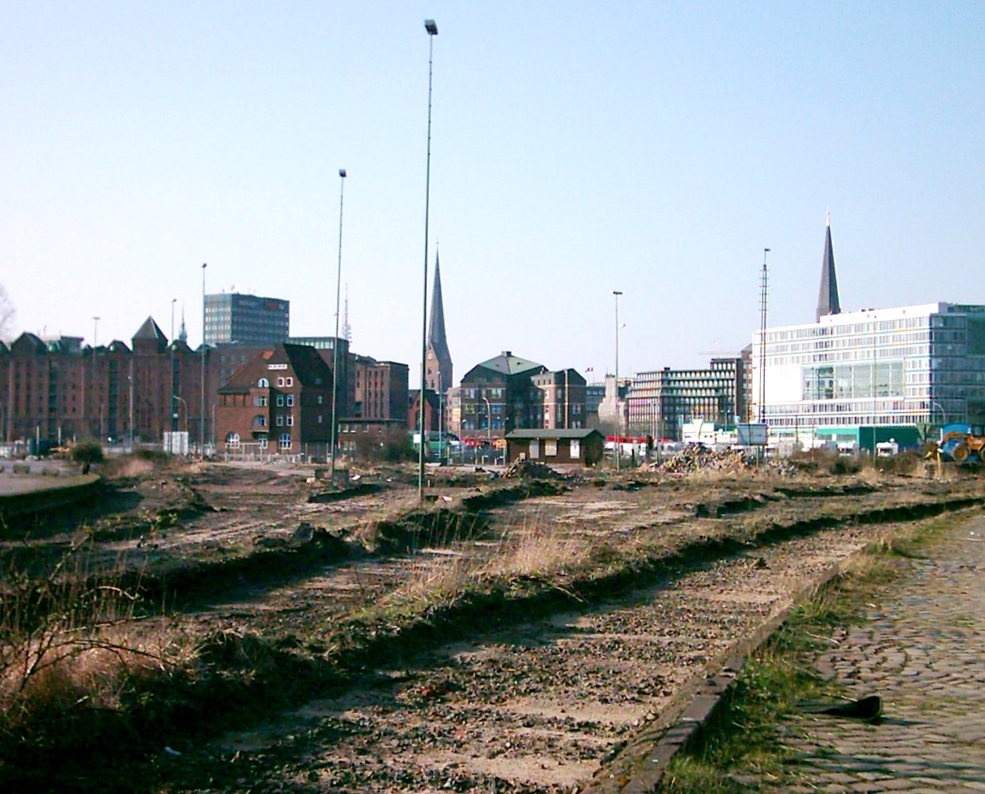 Der Lohseplatz in Hamburg Klostertor. Hier befand sich ab 1872 der Hannoversche Bahnhof, der 1955 abgerissen wurde.